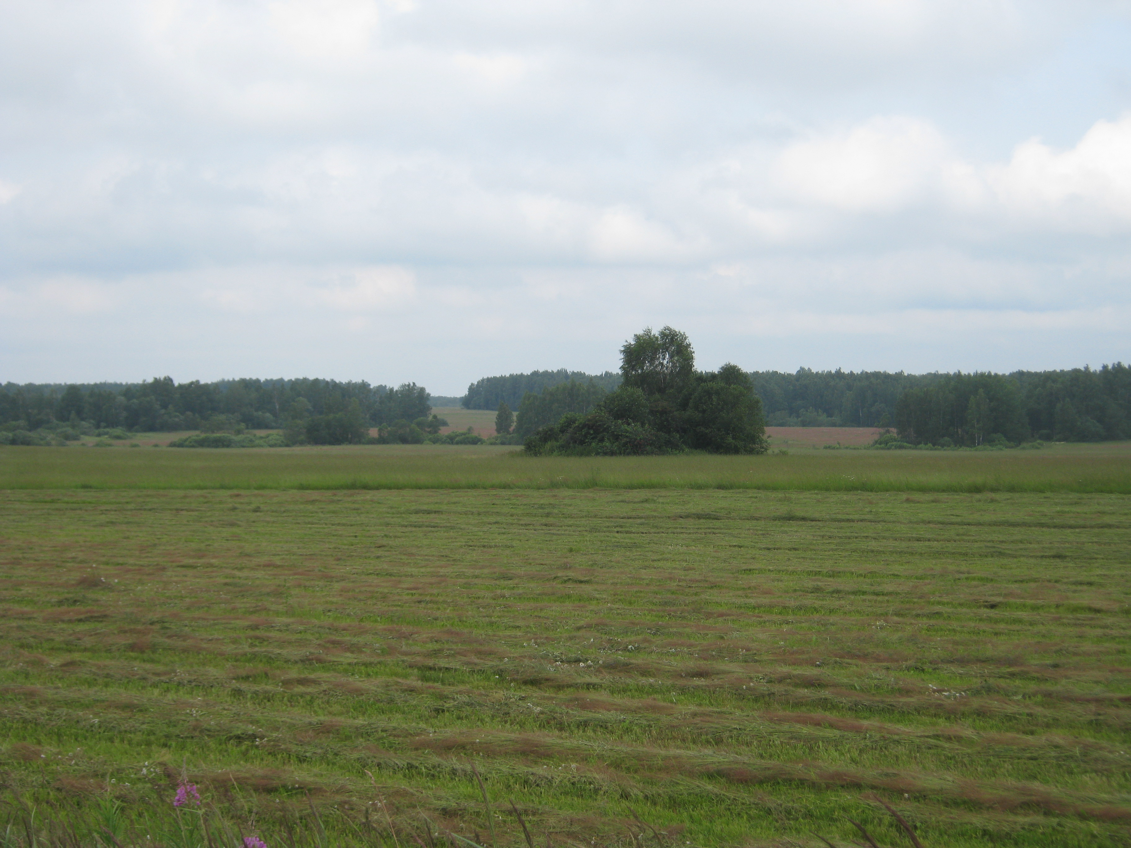 Поле около деревни Барсуки Гагаринского района Смоленской области